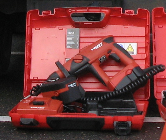 Perforateur sur batterie de marque Hilti